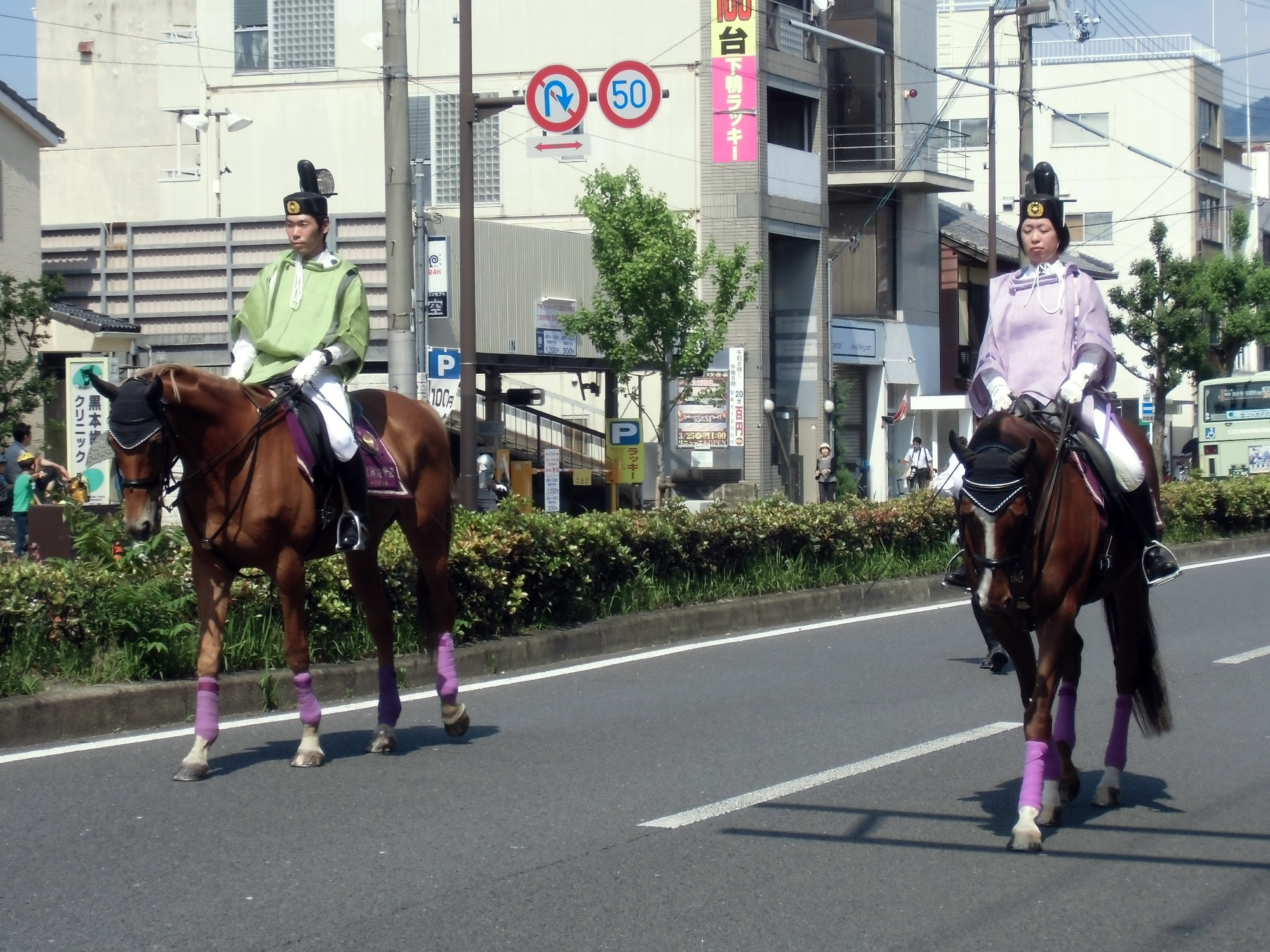 葵祭の行列を先導する平安騎馬隊